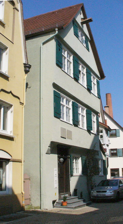 Bildbeschreibung: Biberach an der Riß, Germany, Geburtshaus Eberhard Emminger Quelle: selbst fotografiert Fotograf: user:Enslin Sonstiges